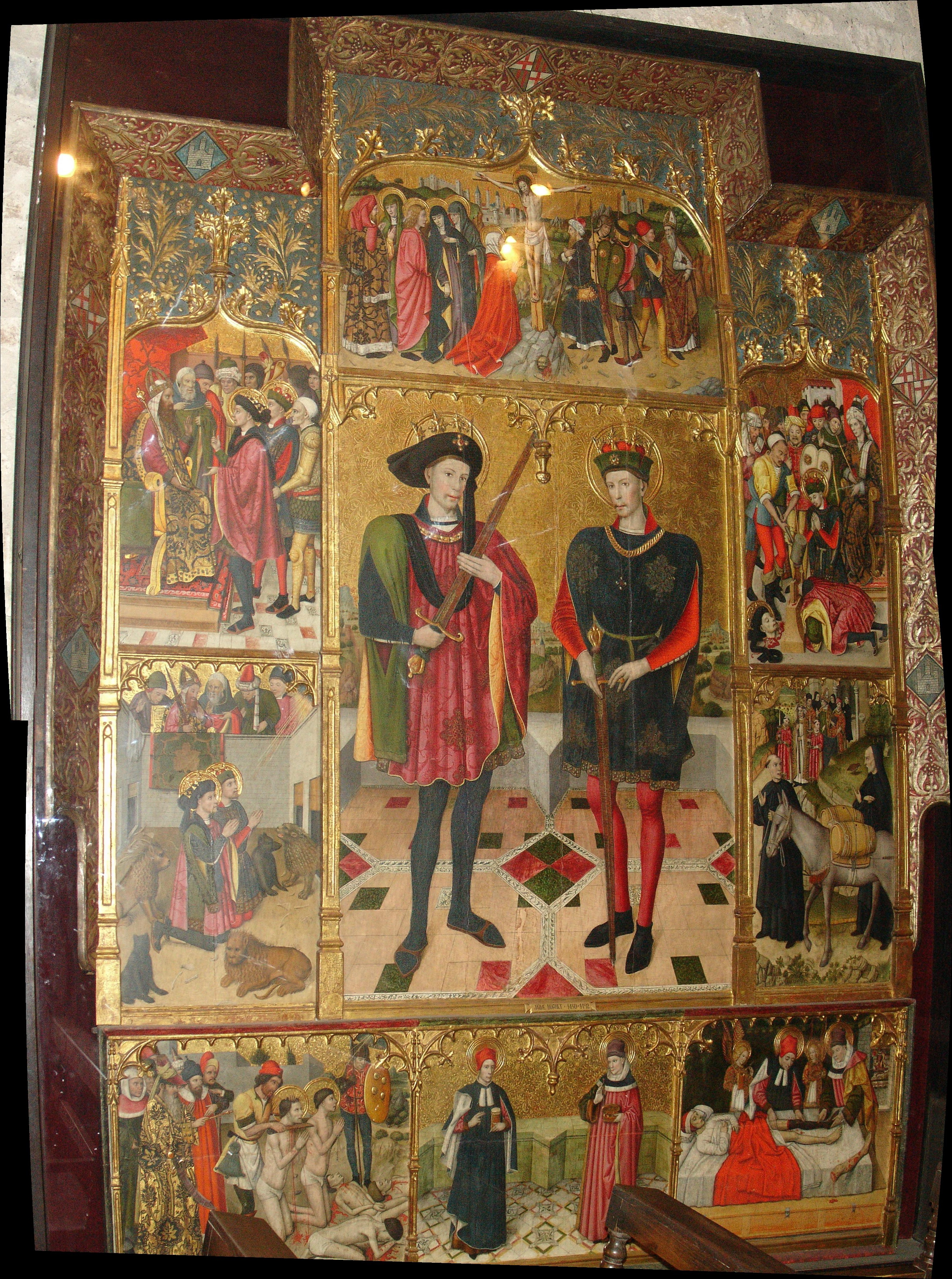 Representa els sants Abdó i Senén i la pradel.la és dedicada als sants metges Cosme i Damià. És una de les poques obres que es poden atribuir amb tota certesa a Jaume Huguet, ja que se'n conserva el contracte de l'any 1460. Huguet és l´únic representant català de la tendència flamenca, que domina el període final del gòtic. A la taula central hi són representants els sants titulars, Abdó i Senén, prínceps de Pèrsia que van ser capturats i morts a Roma. Per causes desconegudes, sembla que les relíquies d'aquests sants van ser traslladades a Arlés del Tec (Vallespir) i d'aquí la rao que gaudissin d'un culte ben arrelat a Catalunya, invocats com a patrons de la pagesia i coneguts com Sant Nin i Sant Non. Composen el reatule un Calvari i quatre escenes relatives als sants. A la pradel.la es descriuen escenes del matitiri i la mort dels sants Cosme i Damià, metges amb un possible origen àrab i, com els anteriors, també molt venerats a Catalunya. Al guardapols, decoracions de tipus vegetals i les armes de Terrassa i Barcelona. Actualment es troba a l'Església de Sant Pere de Terrassa.